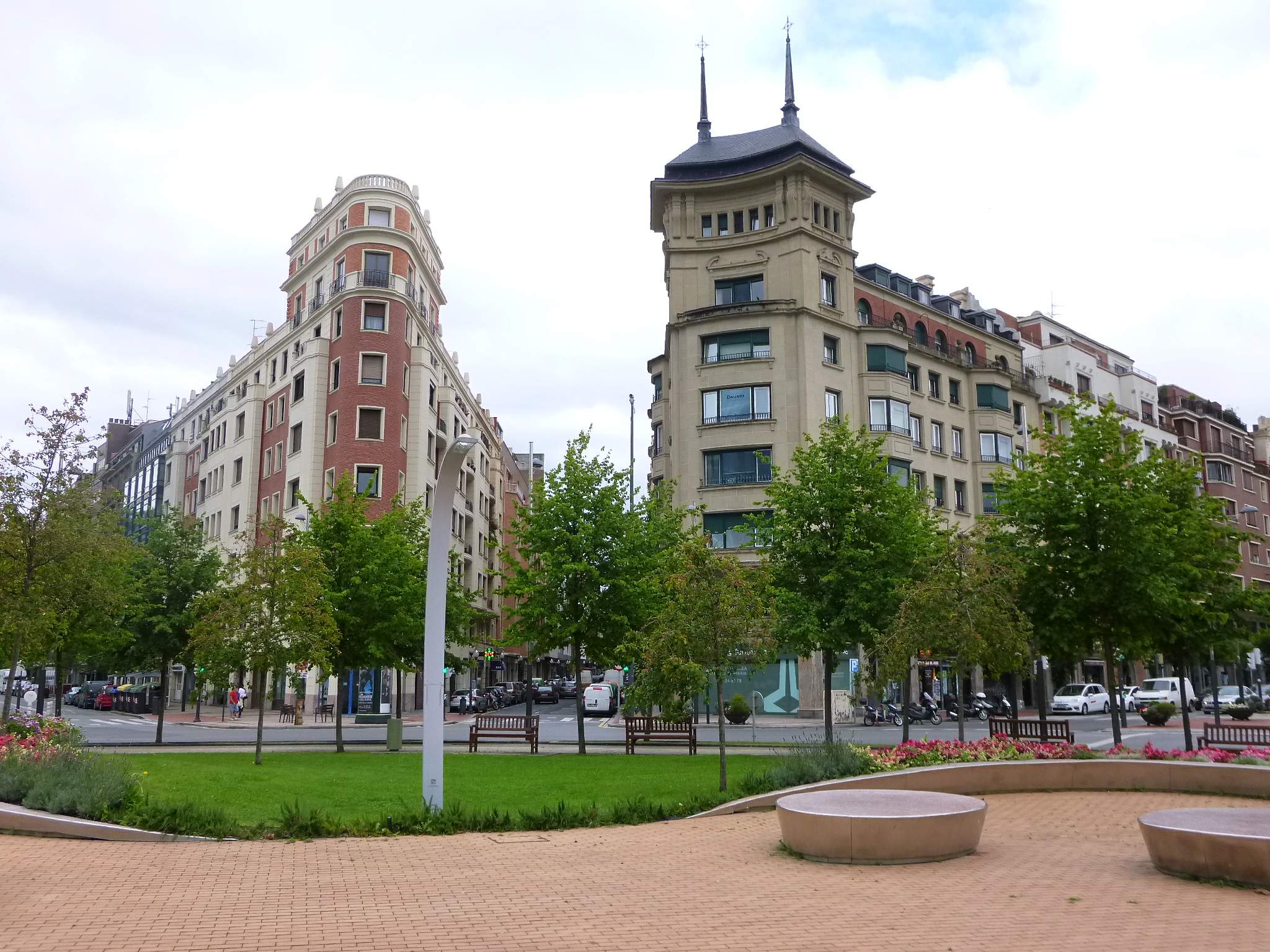 Plaza Euskadi (Bilbao)